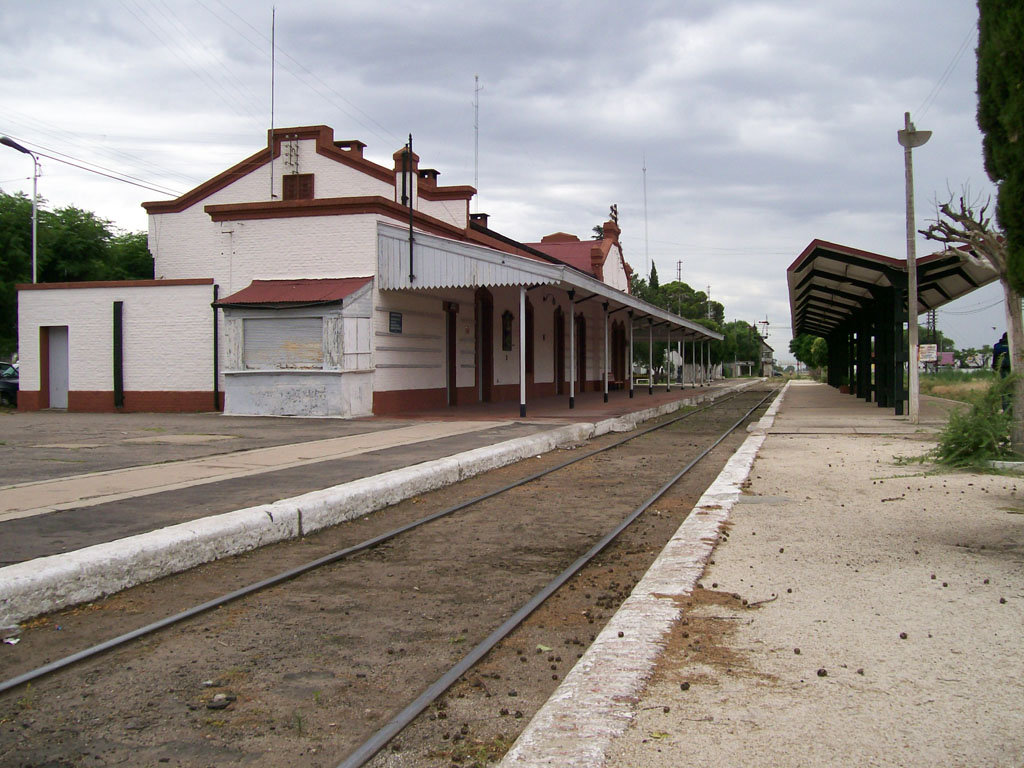 Estación General Pico